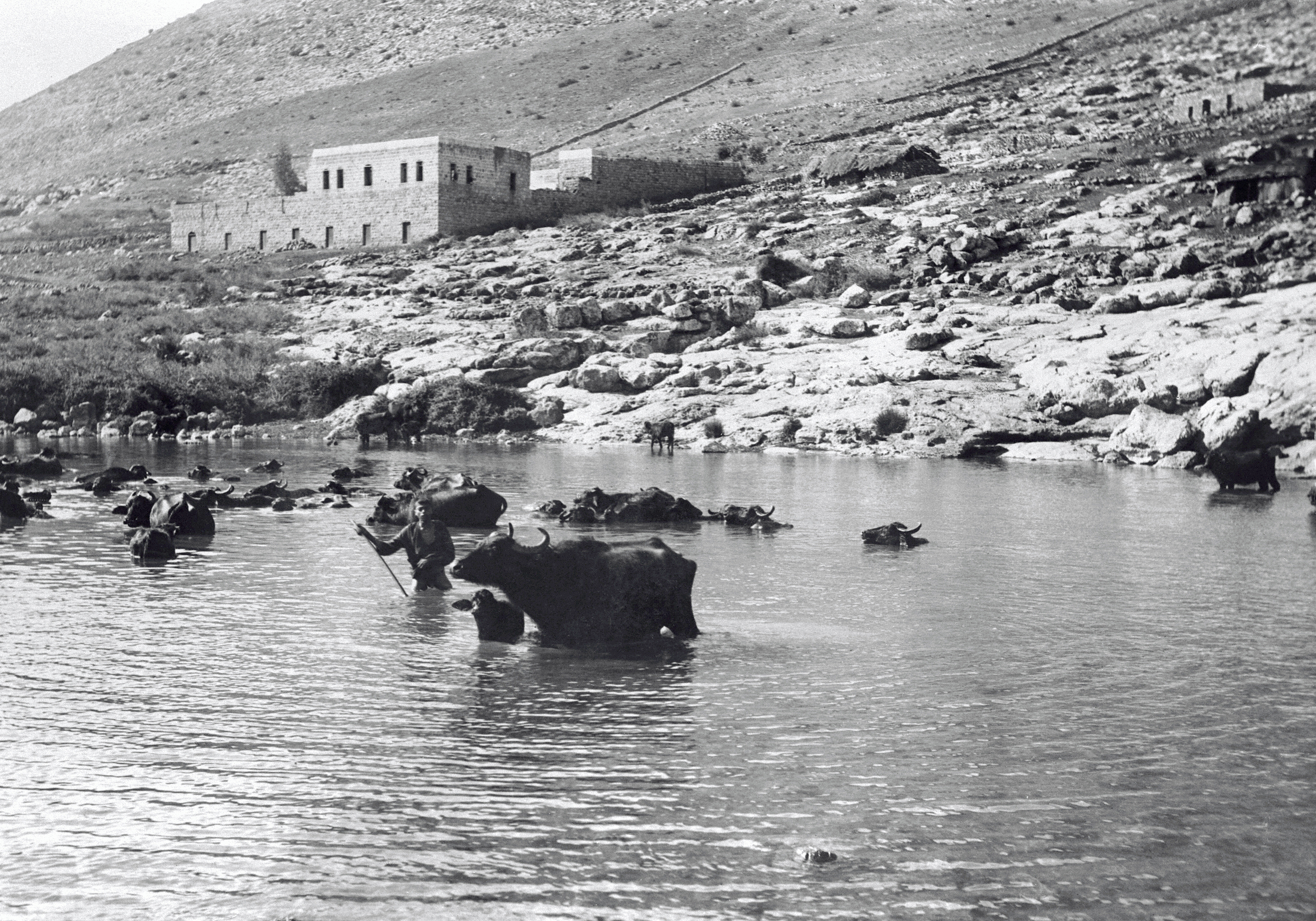 ביצות החולה 1923